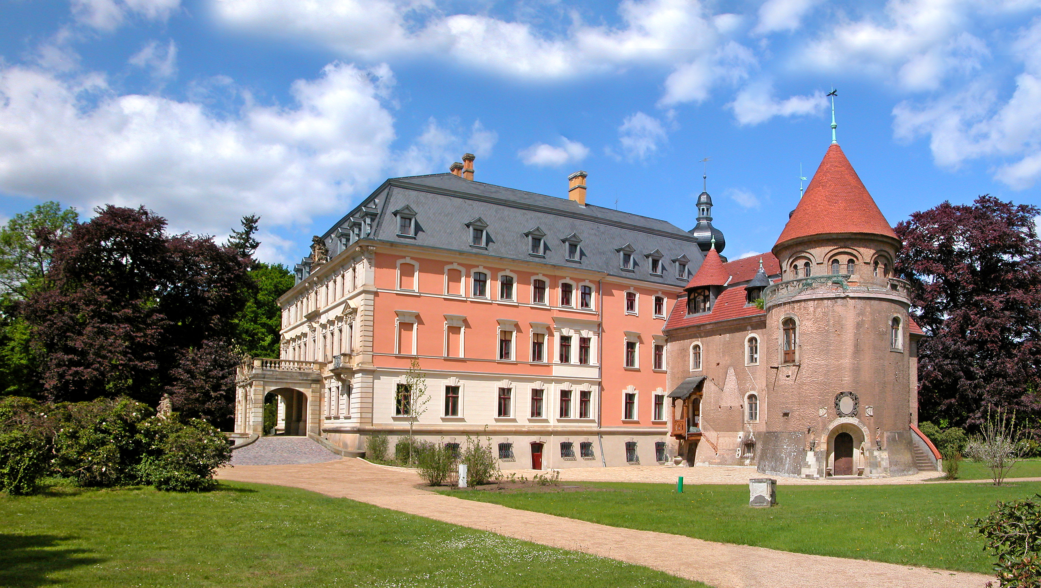 13.05.2015 03229 Altdöbern: Barockschloß (GMP: 51.653714,14.035239) von SO. Das Schloß geht auf eine frühdeutsche Wasserburg zurück. 1712 erwarb Alexander Dietrich von Eickstedt den Besitz, ließ er den Vorgängerbau niederreißen und ab 1717 das heutige Schloss im barocken Stil errichten. Bis 1750 ließ der neue Besitzer, Carl Heinrich von Heineken, d. Anlage prunkvoll ausbauen, den Garten erheblich vergrößern und mit Kanälen, Wasserbecken, Springbrunnen, Brücken, Pavillons und kostbaren Sandsteinplastiken ausstatten. In den Jahren 1880 - 83 erhielt die Gesamtanlage ihr endgültiges Gesicht. Nach dem Krieg ging das Anwesen in die Rechtsträgerschaft der Gemeinde Altdöbern über, die das Schloß 1946 dem Caritas-Verband vermietete. Dieser nutzte es zunächst als Waisenhaus u. danach in der DDR bis 1974 als Kinder- und Altenheim. Das Schloß befindet sich seit 1996 im Eigentum der Brandenburgischen Schlösser GmbH. [DSCN5553+5554.JPG]20150513090MDR.JPG(c)Blobelt